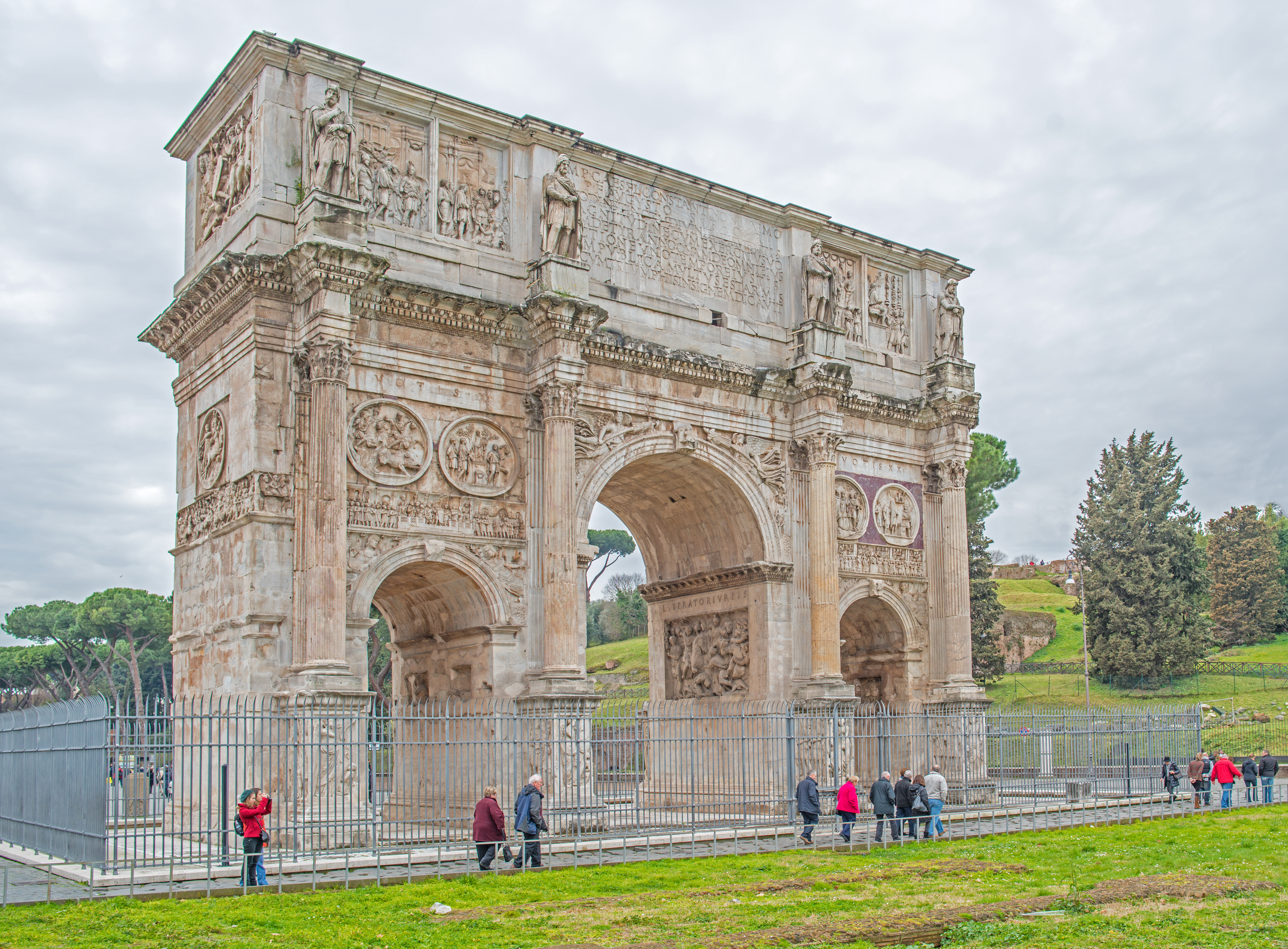 Arco di Constantino Rome Italy February 2013